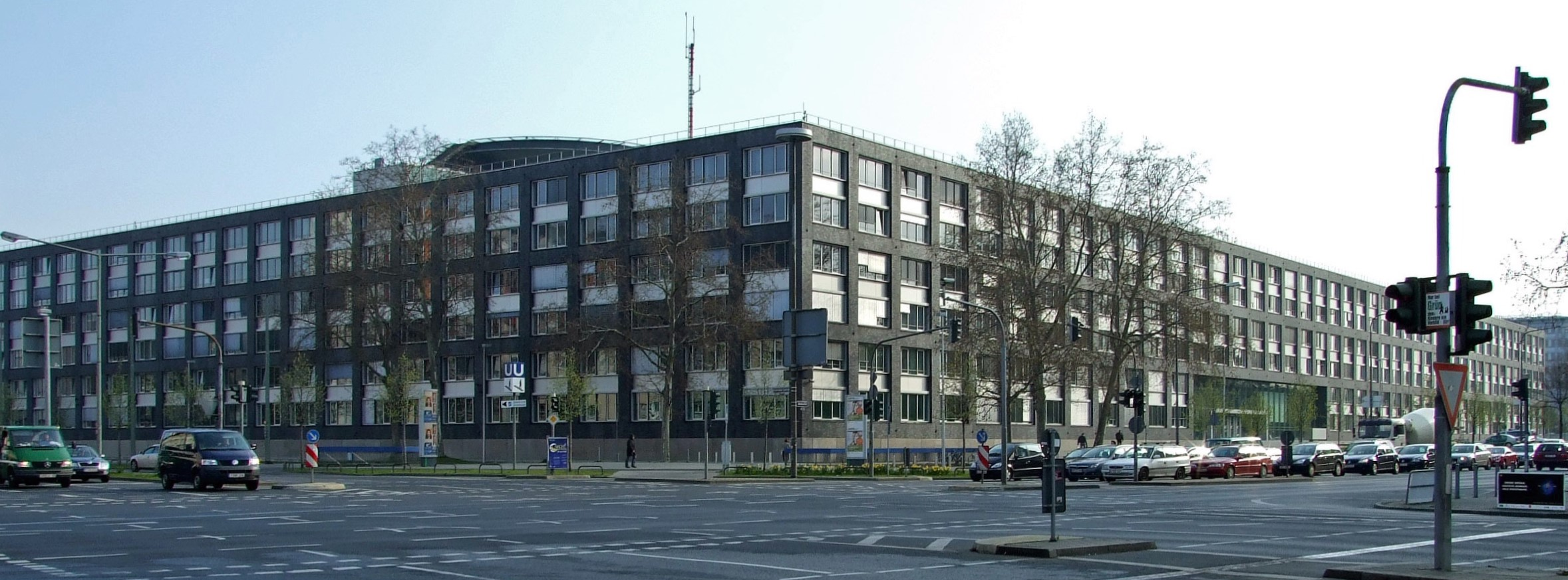 Polizeipraesidium in Frankfurt am Main, Ecke Eschersheimer Landstrasse/Adickesallee